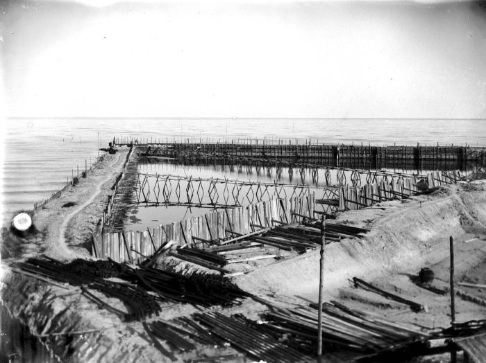 Negatief. Indamming van de groeve Sultan, Singkep Tin Maatschappij, Riouw